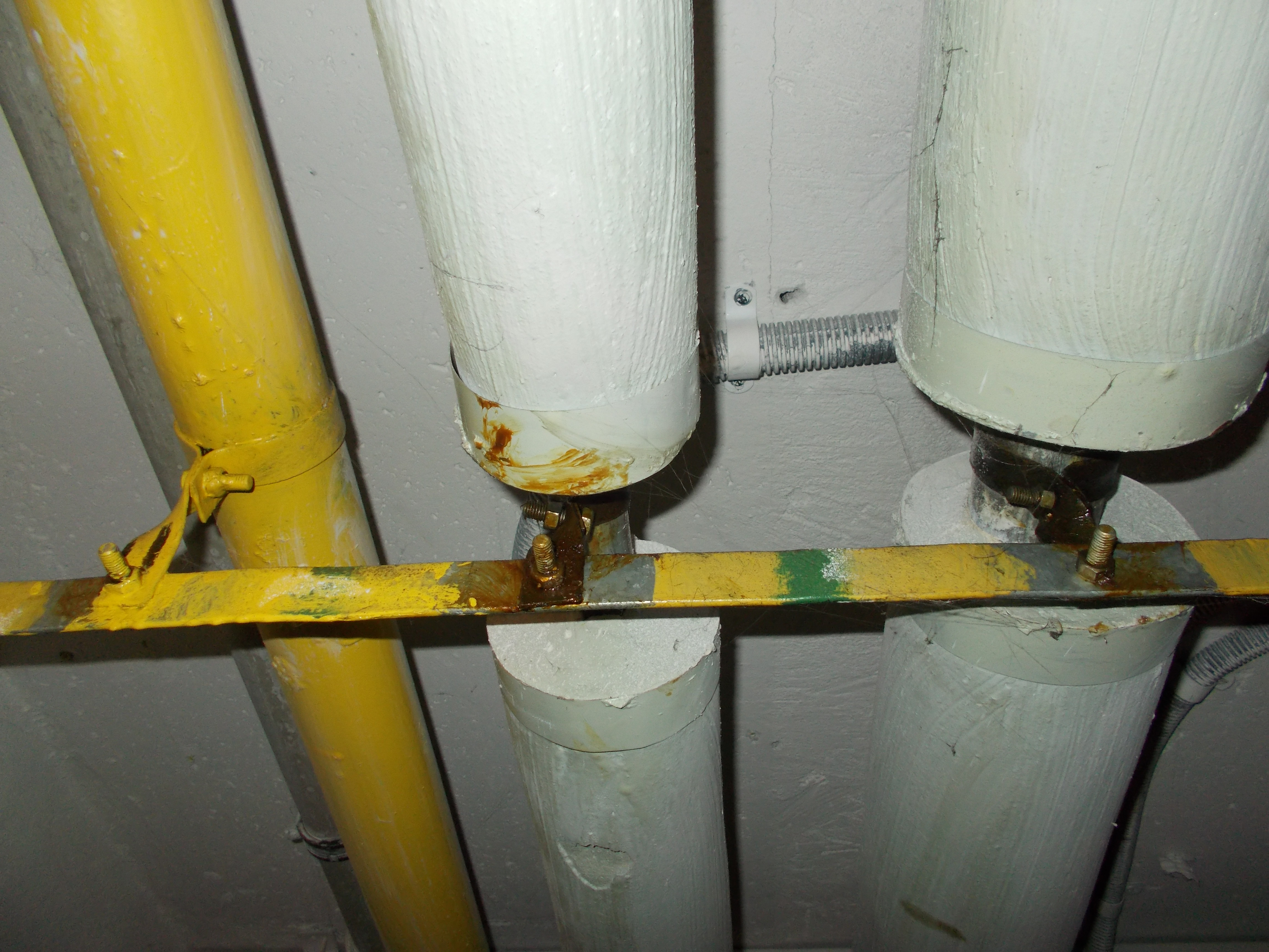 Połączenie wyrównawcze zrobione przewodem stalowym (bednarką)